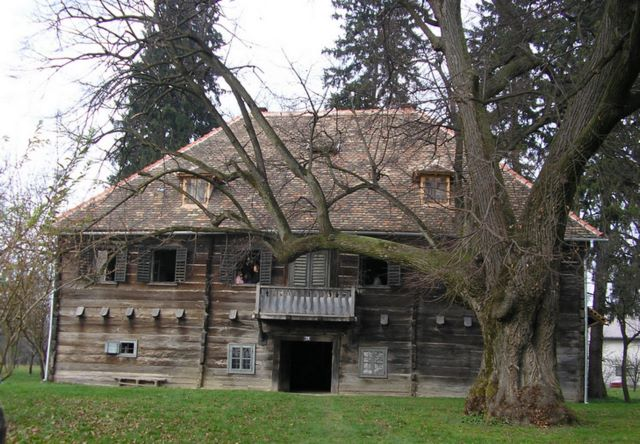 Kurija Modić Bedeković.